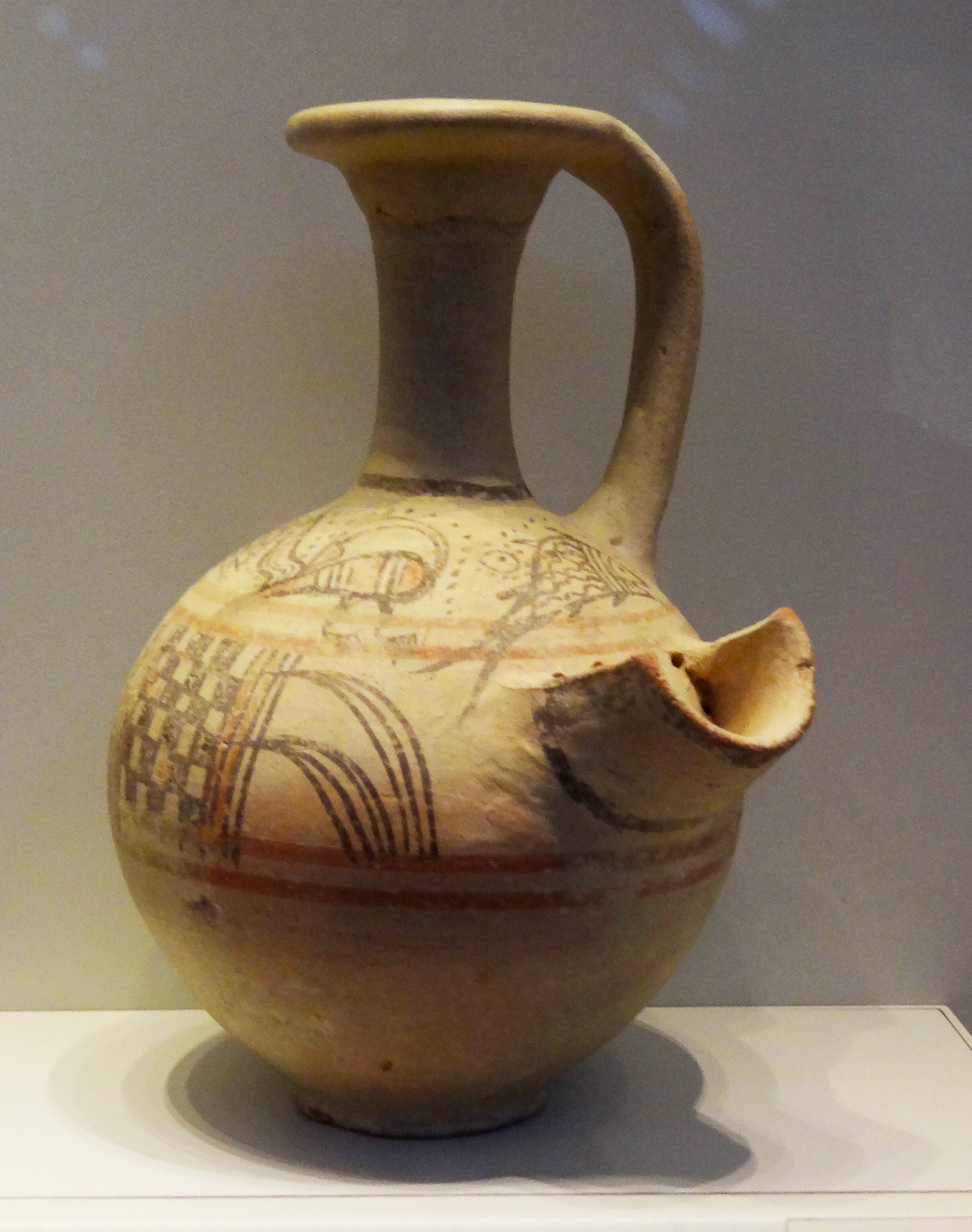 Philistine pottery קרמיקה פלשתית From Tel Eton פך בירה מעוטר בציפורים, דגים ומוטיבים גיאומטריים, תל עיטון המאה ה-12 לפני הספירה